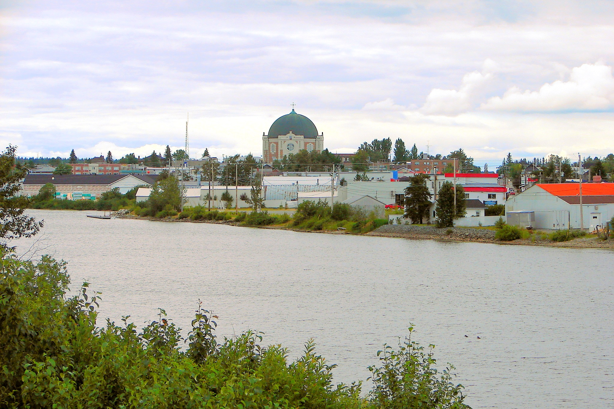 Harricana in Amos, Quebec, Canada